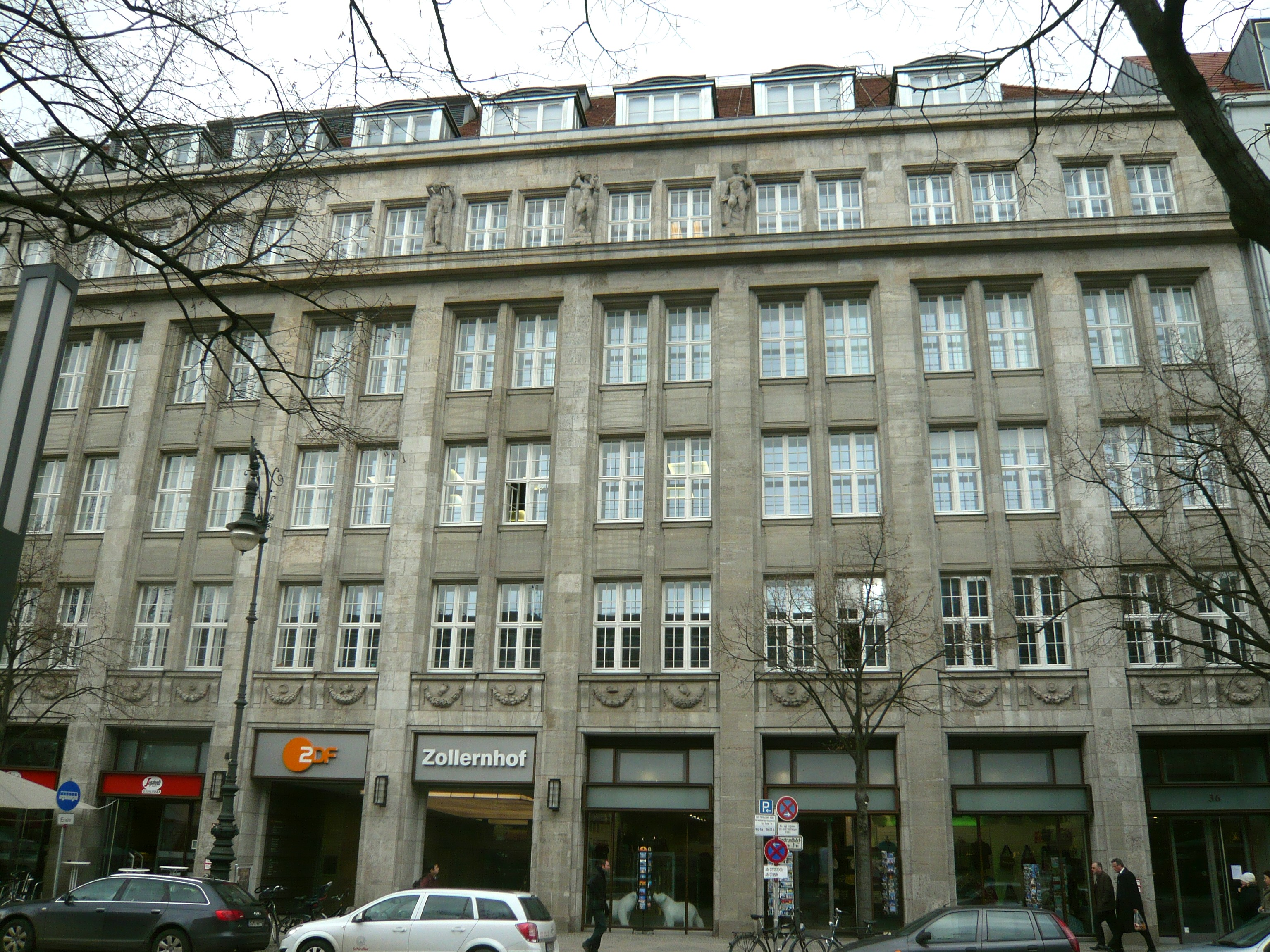 Zollernhof in Berlin-Mitte, Ansicht von „Unter den Linden“